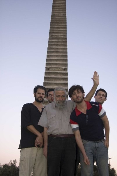 אנדרה היידו ותלמידיו: מתי קובלר, נורי יעקבי, יונתן ניב ויאיר הראל